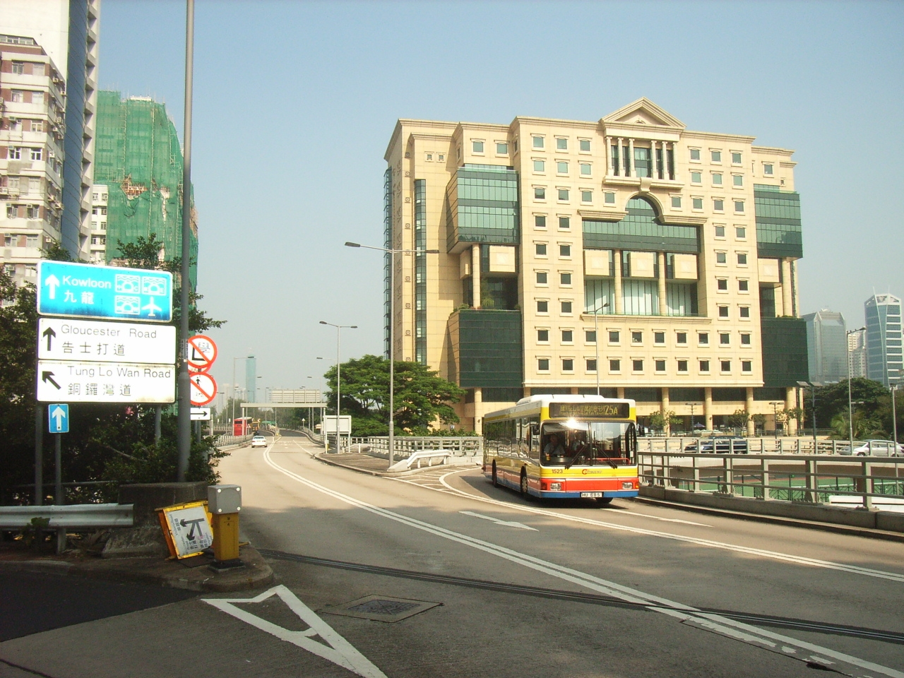 大坑道 User:Sun Victoria